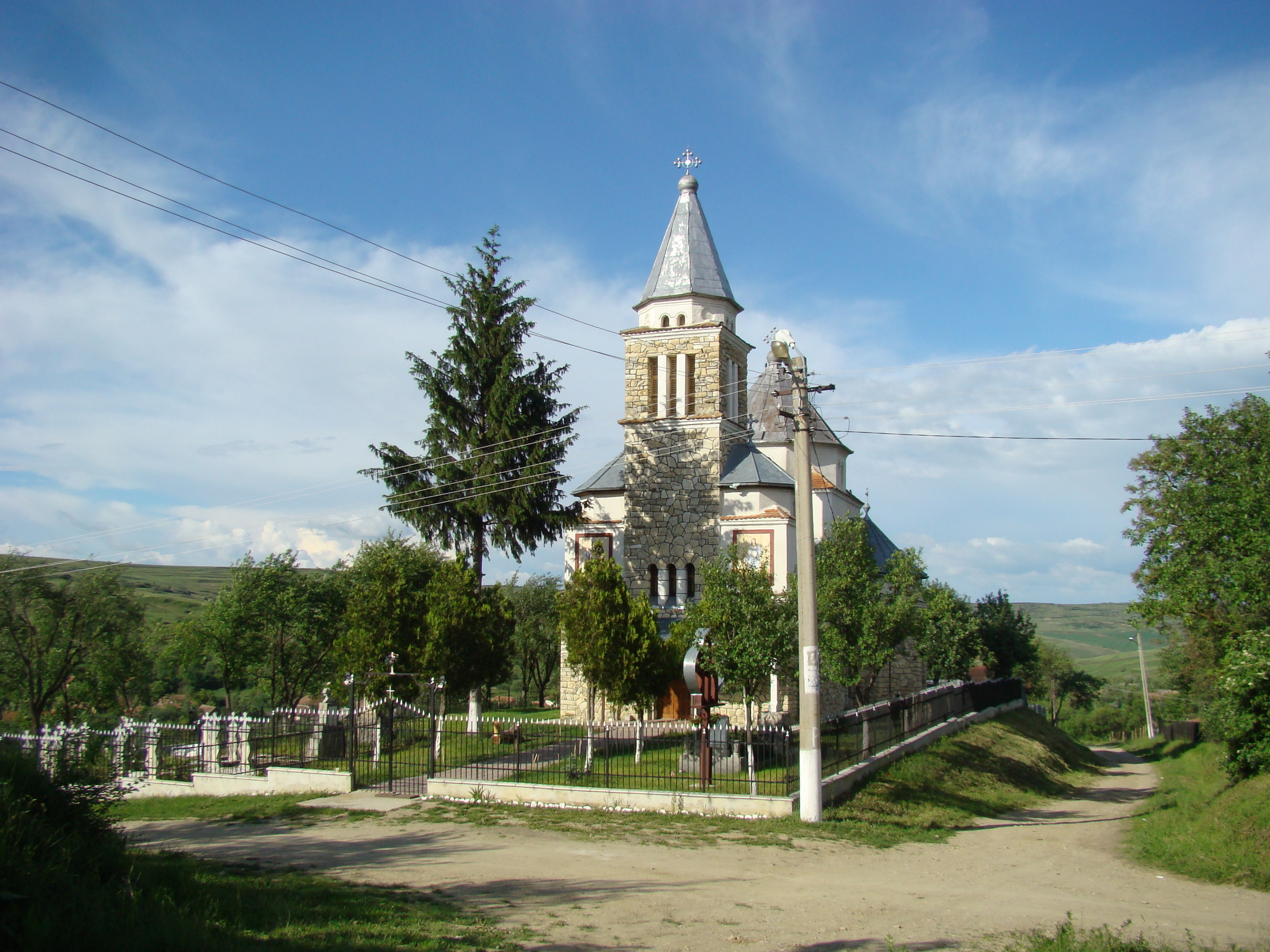 Biserica „Sfinții Arhangheli Mihail și Gavriil”, sat FEIURDENI; comuna CHINTENI, județul Cluj